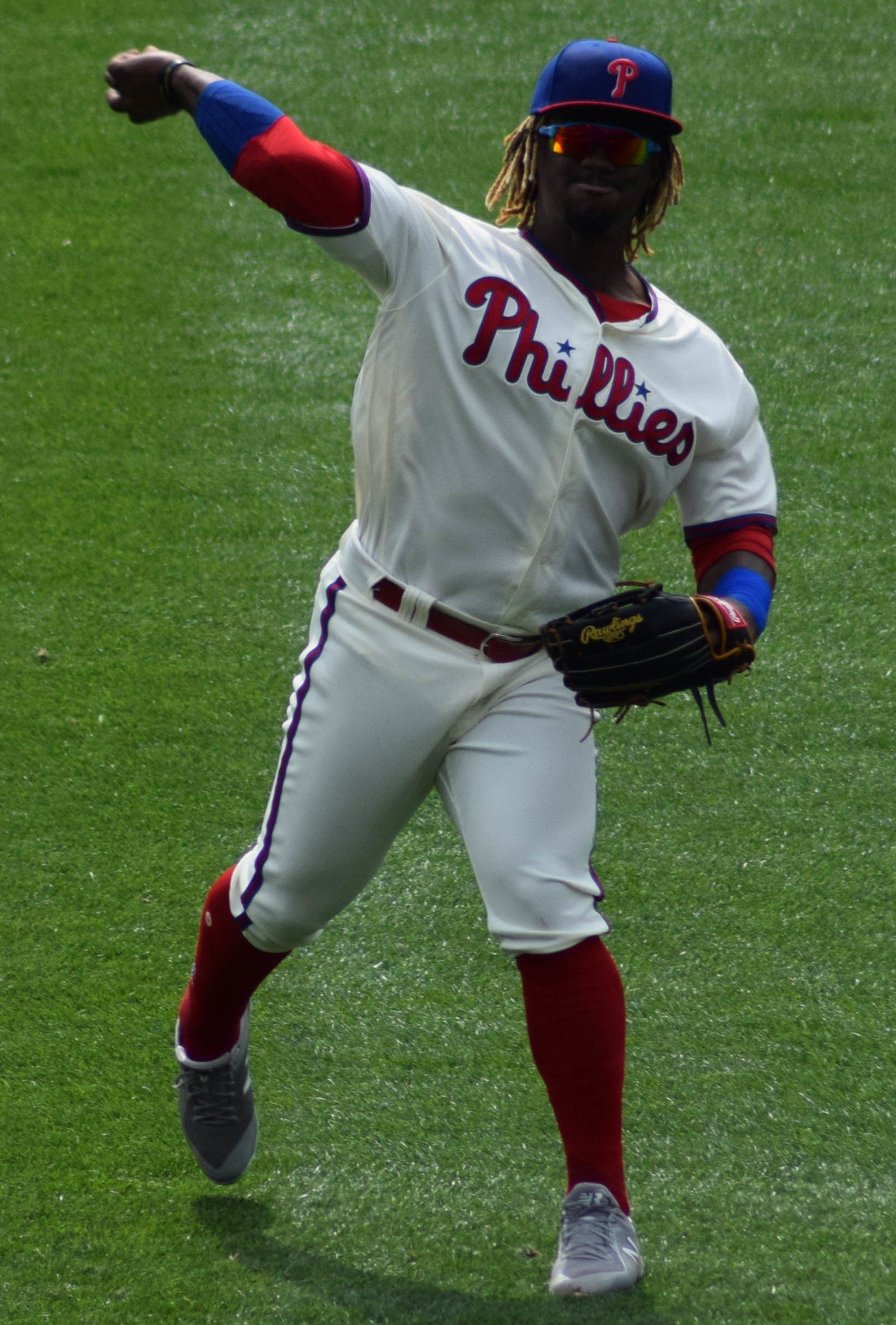 Odubel Herrera